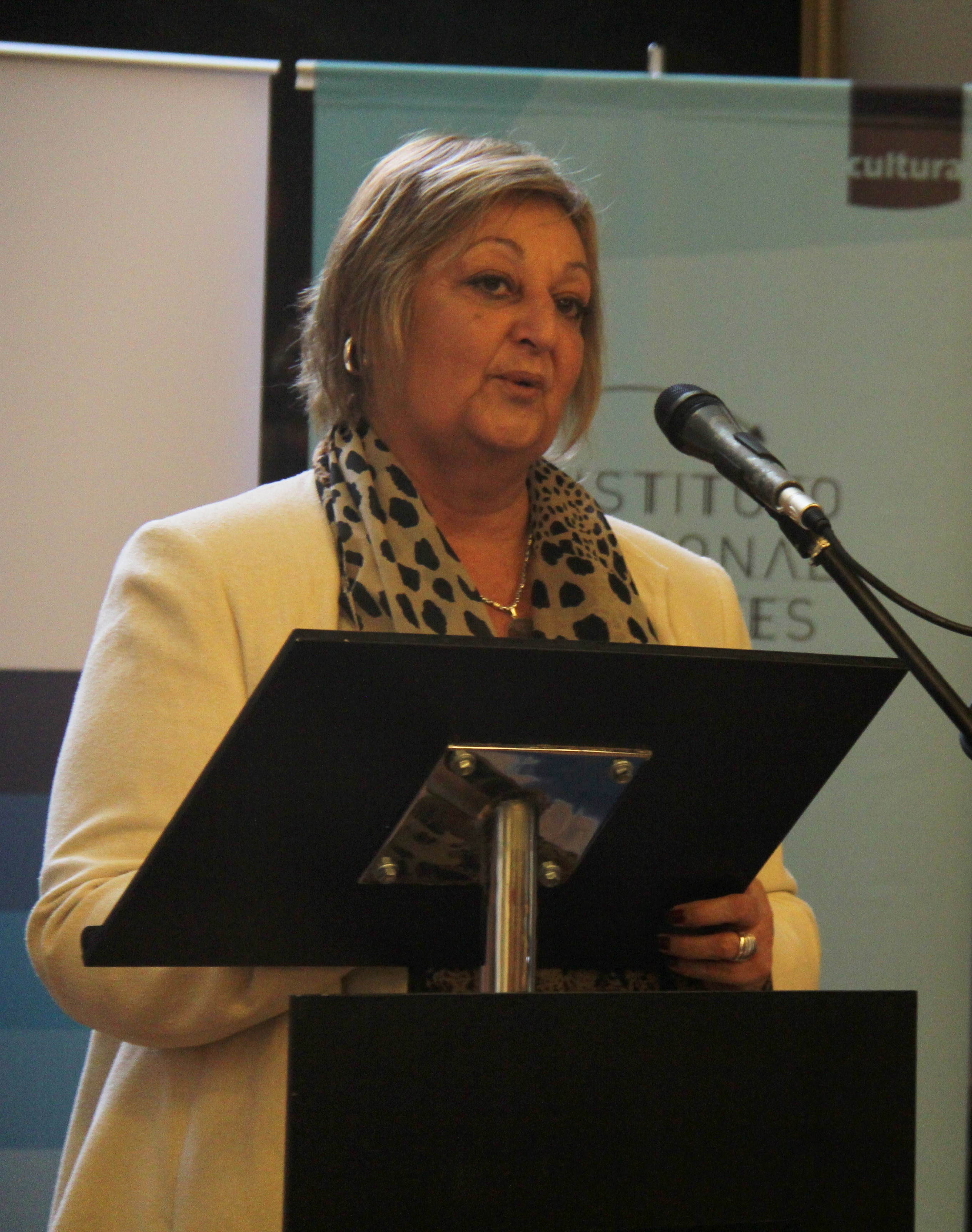 Liliam Kechichián, ministra de turismo de Uruguay, en el lanzamiento del Festival Internacional Cervantino de Montevideo 2016.